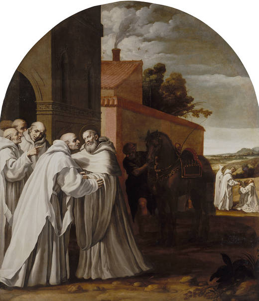 San Bernardo de Claraval visita a Guigo I en la cartuja.label QS:Les,"San Bernardo de Claraval visita a Guigo I en la cartuja."